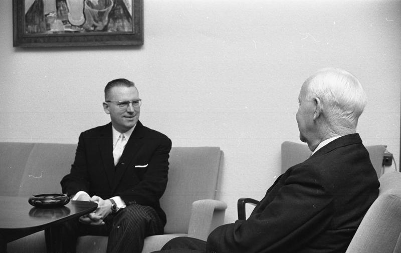 Bundespräsident Lübke empfängt den Minister für Bundesangelegenheiten des Landes Nordrhein-Westfalen, Dr. Posser